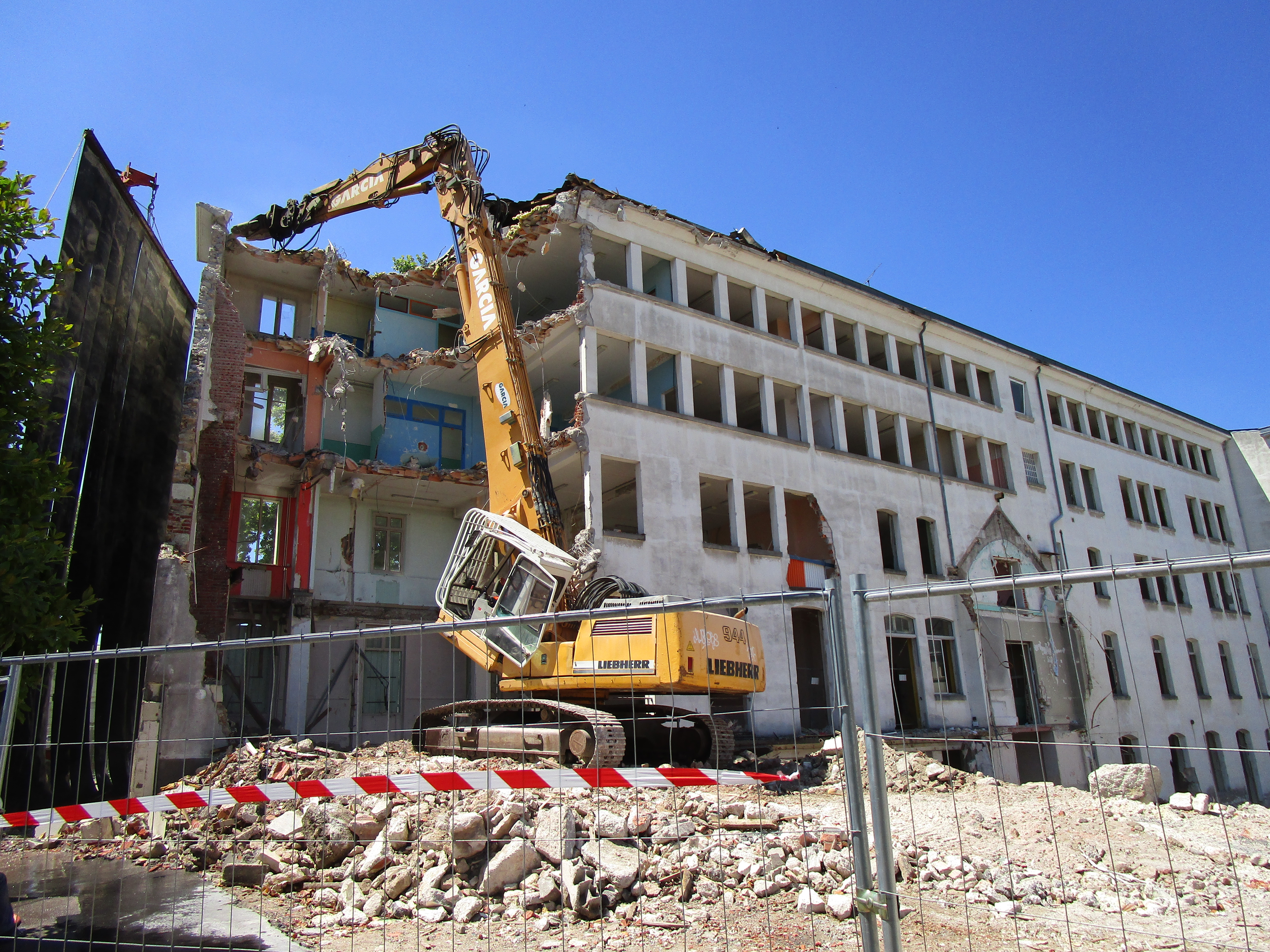 Démolition du lycée privée Sainte Marguerite de Tours, sur l'avenue Grammont